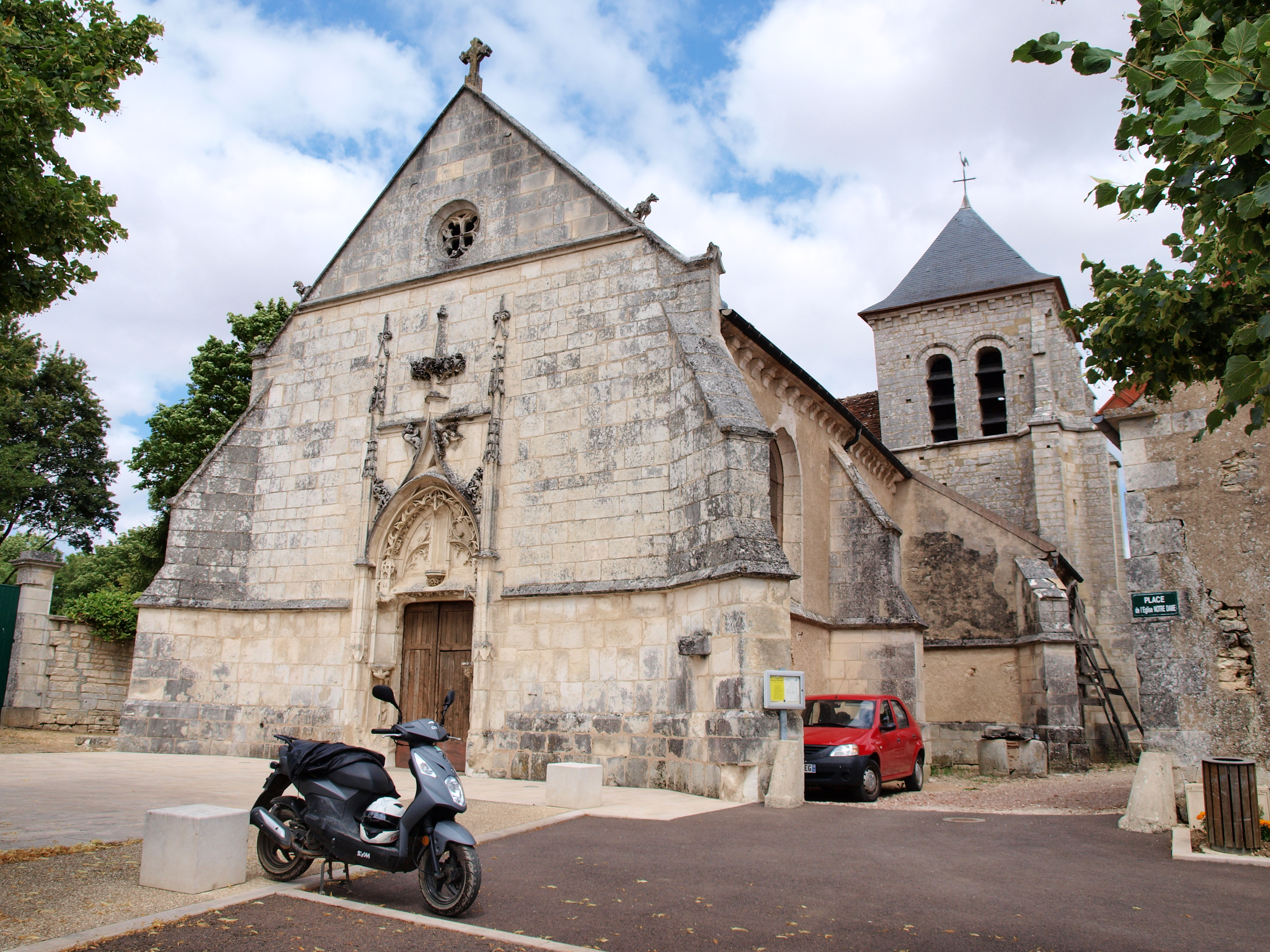 Église Notre-Dame de Molesmes (Yonne, France)